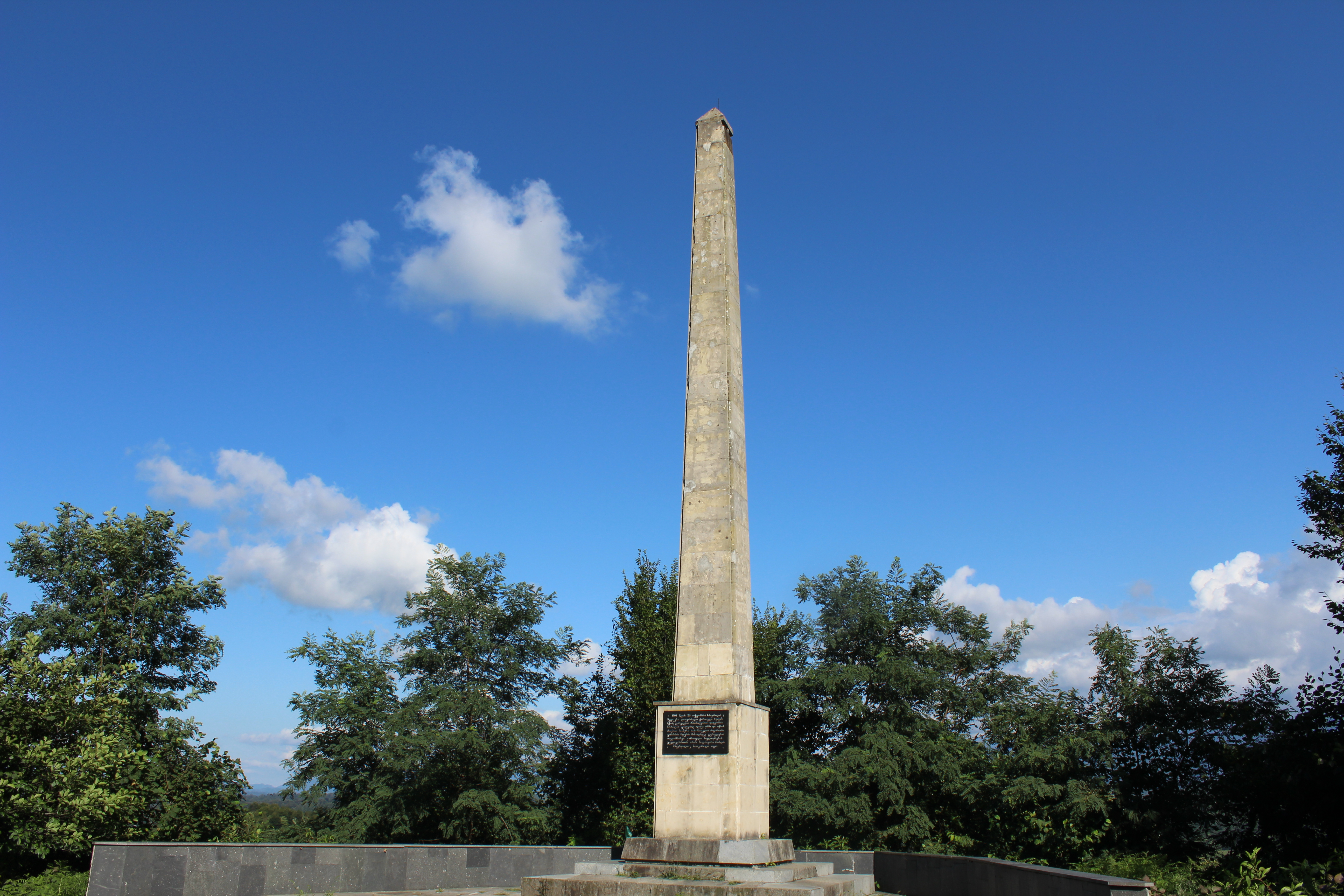 ნასაკირალის ობელისკი